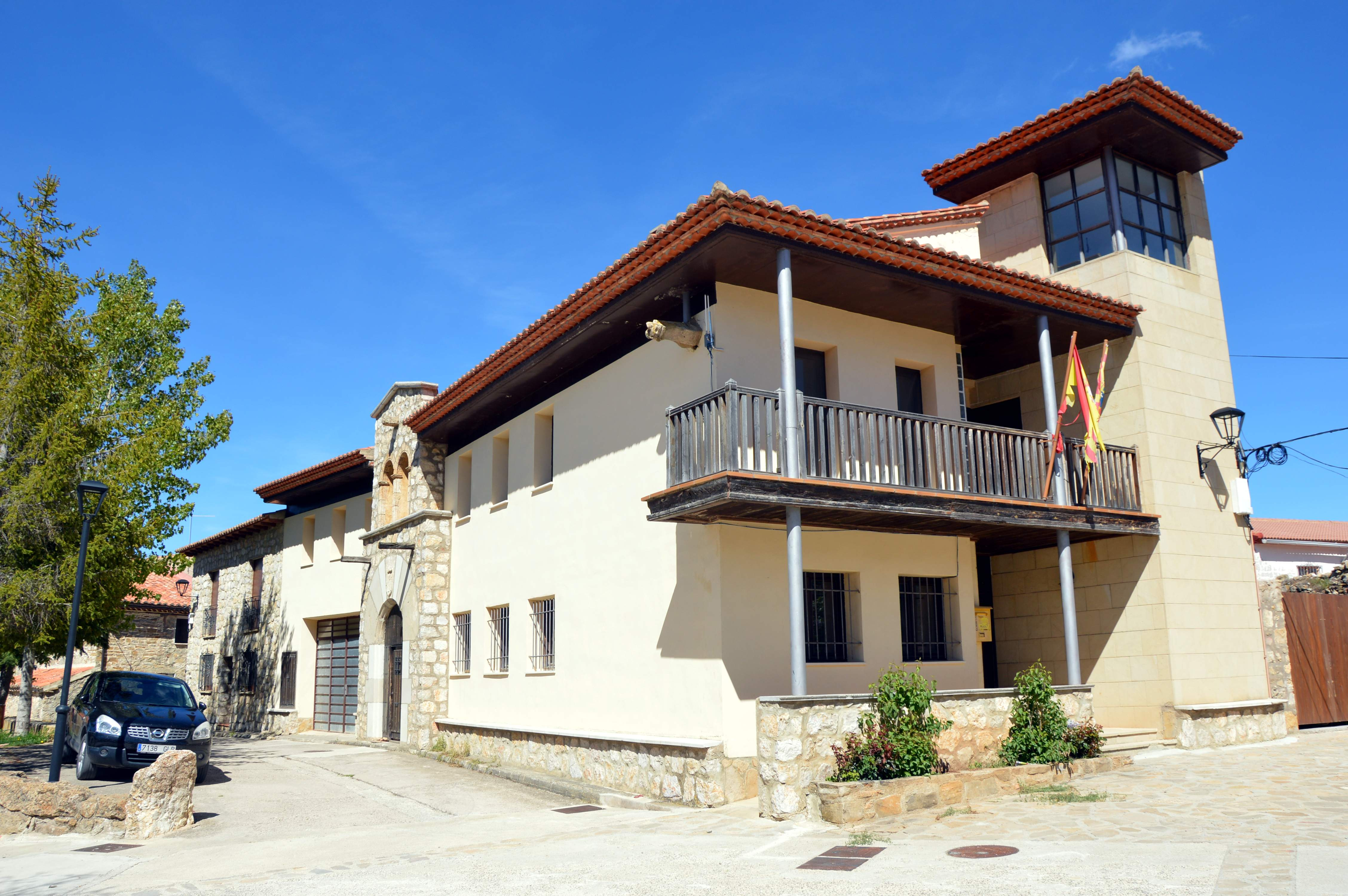 Vista fronto-lateral izquierda de la Casa Consistorial de Jabaloyas (Teruel), edificio de nueva planta que contiene elementos arquitectónicos del anterior Ayuntamiento (2017).